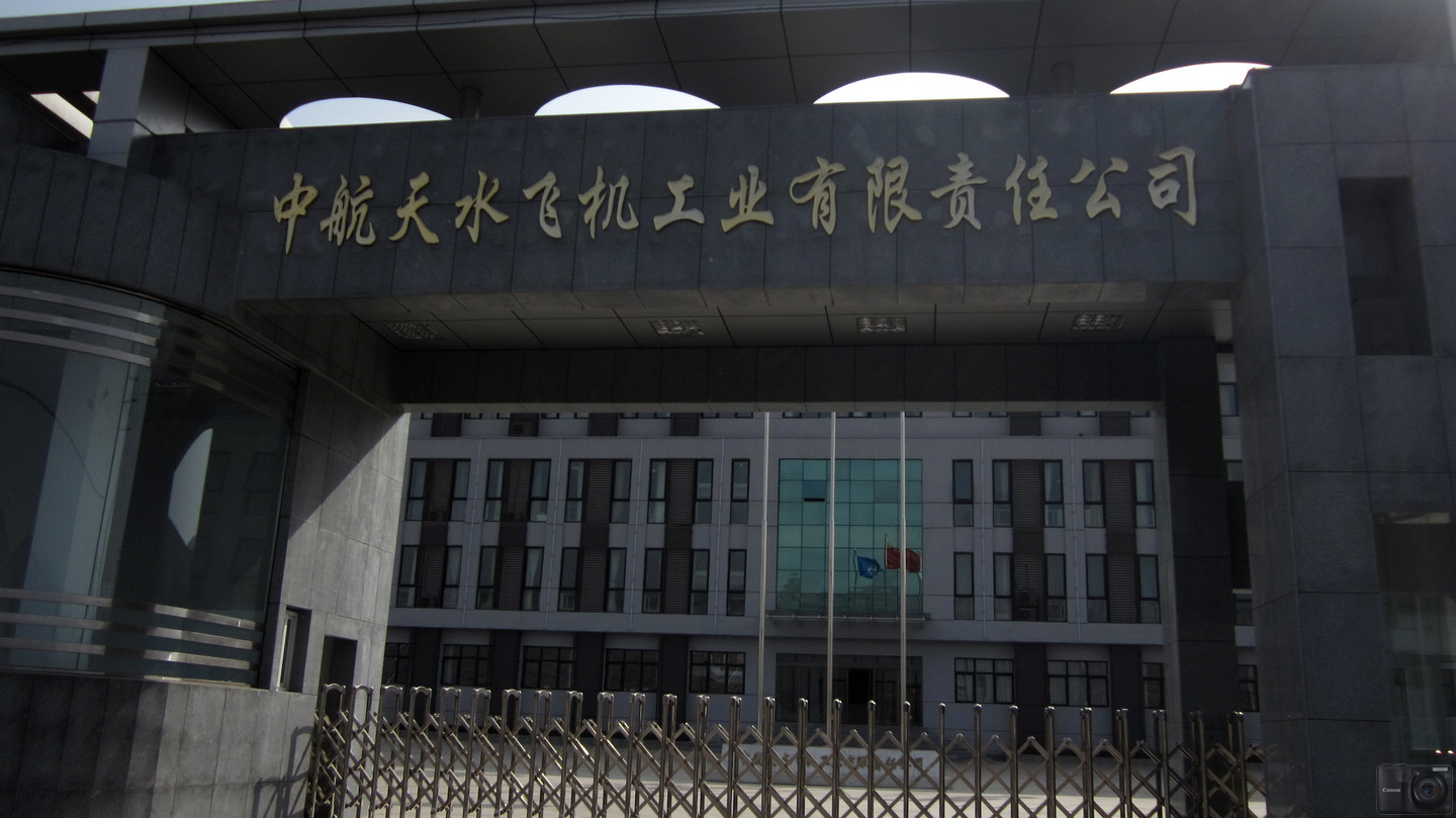 中行天水飞机工业有限公司